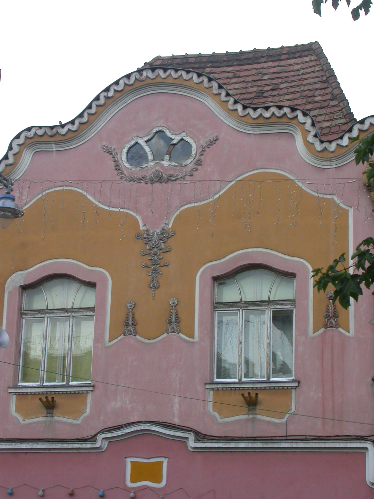 Casa Wamos, 1910